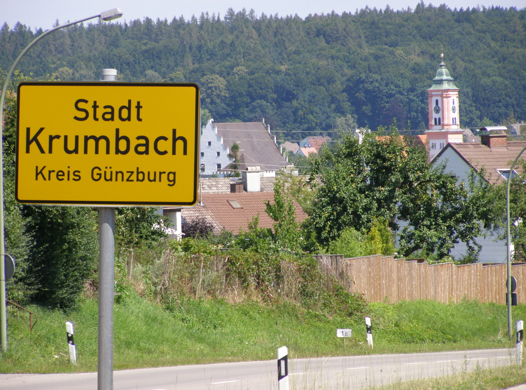 Krumbach (Schwaben) - Zufahrt von Westen (B 300)